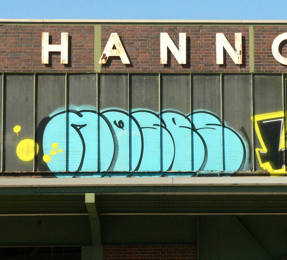 Tag von Moses in Hannover am Güterbahnhof